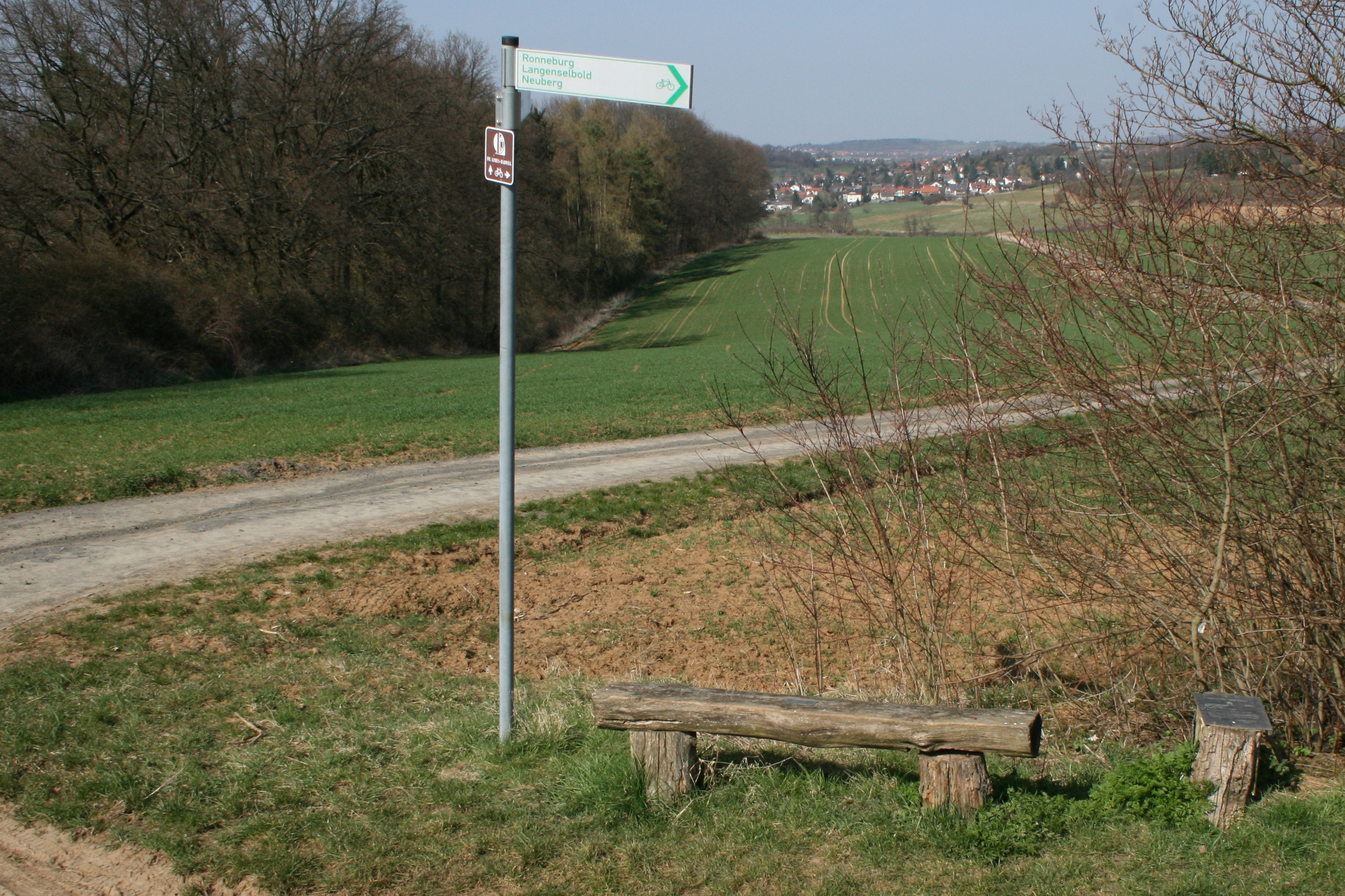 Wachposten 5/2 Auf dem Stein am Wetteraulimes bei Hammersbach-Marköbel. Situation 2009 (das kleine Schild neben der Bank weist auf den Limesturm hin).